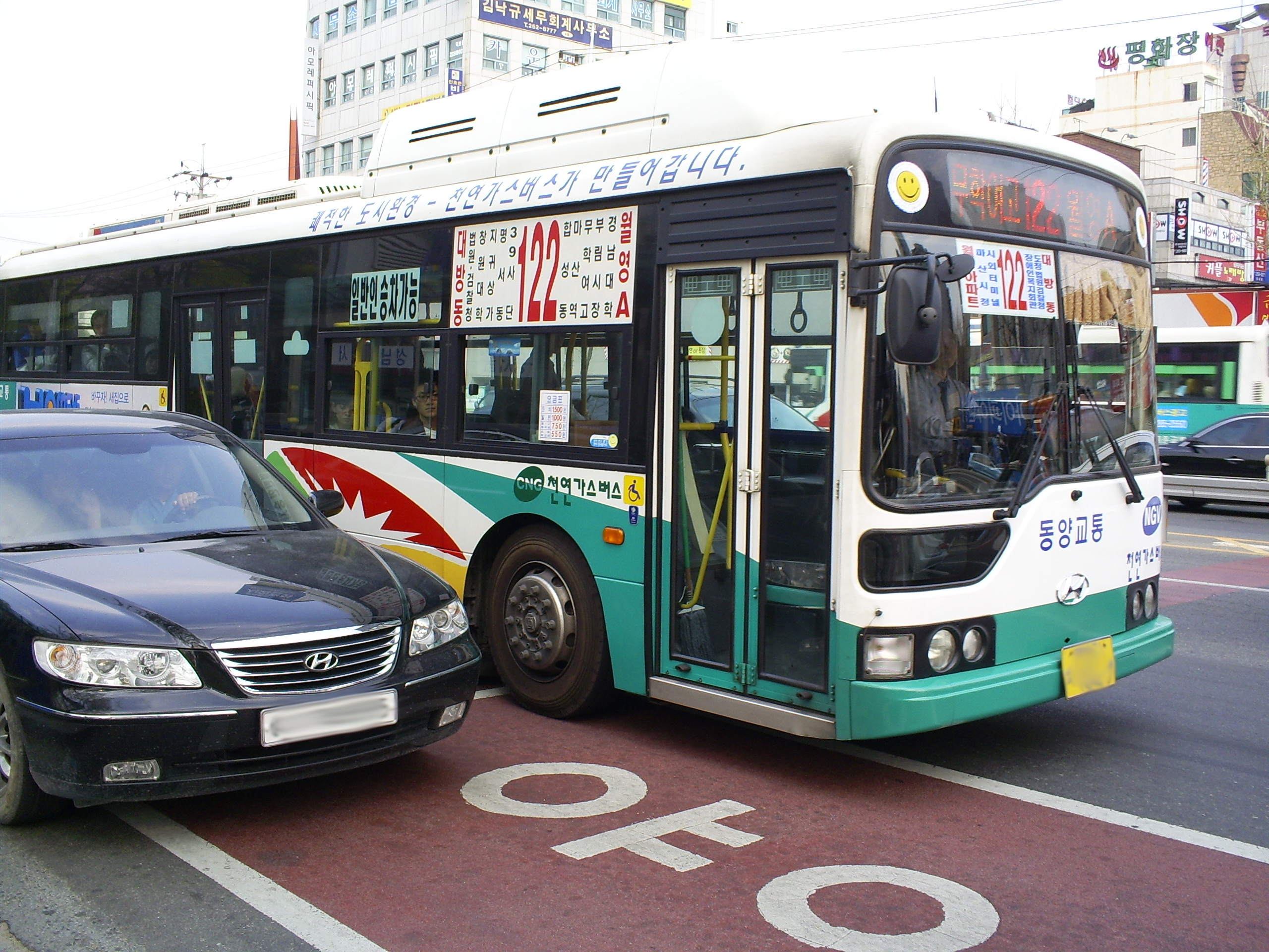 창원시내버스 122번 촬영 사진